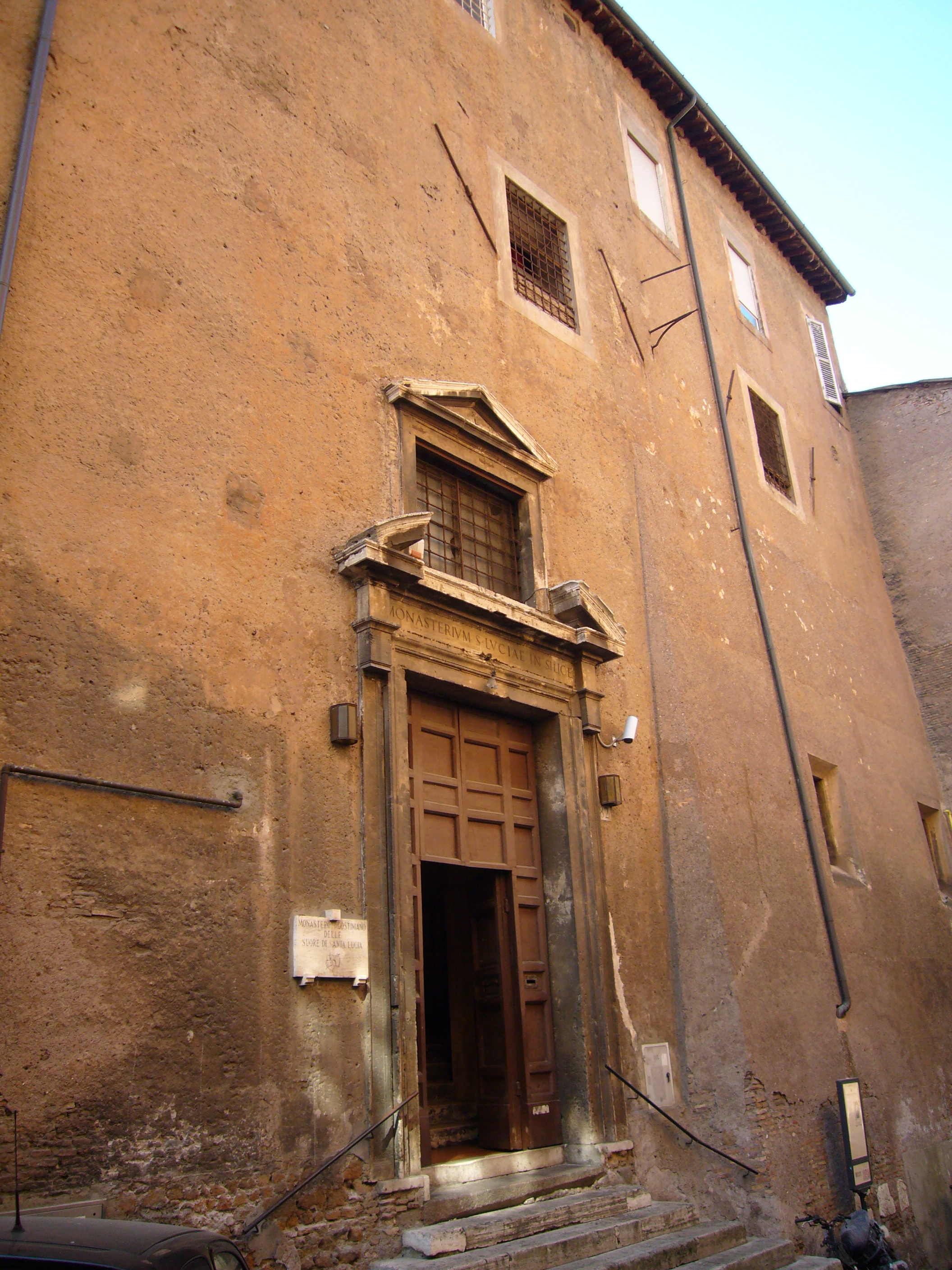 Roma, Santa Lucia in Selci, portale nella facciata del convento